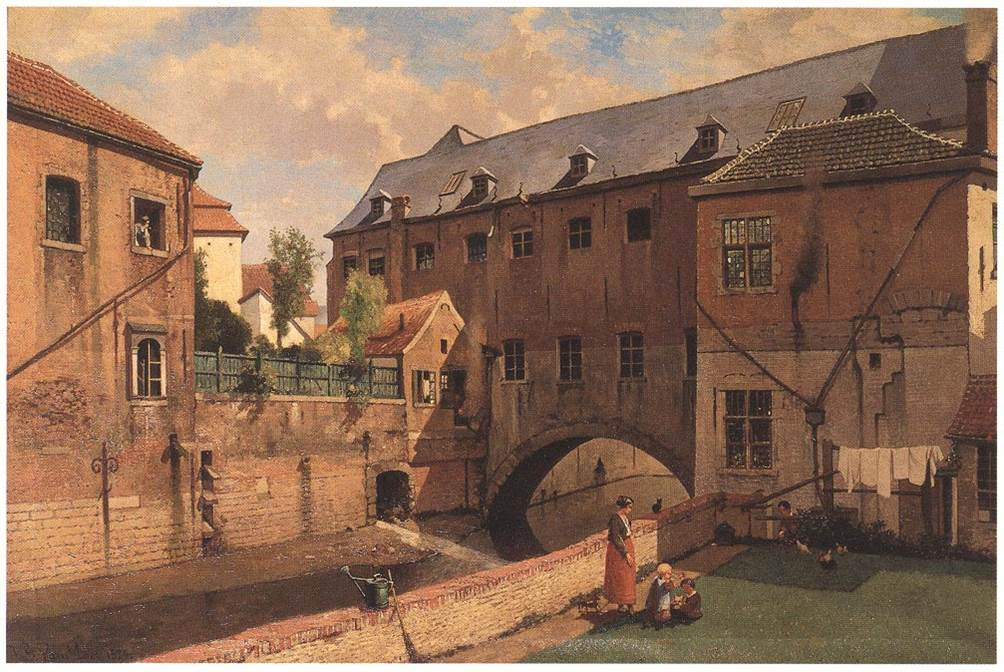 Zicht op de oude brouwerij van de Recoletten en de Vaelbeek